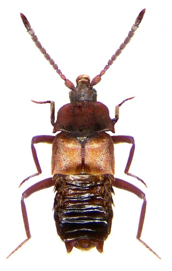 Familie: Staphylinidae Groesse: 3,7-4,3 mm Verbreitung: Europa Ökologie: bei Formica rufa Fundort: Germania, Bayern, Oberfranken, Selbitz leg.det. U.Schmidt, 2003 Foto: U.Schmidt, 2006